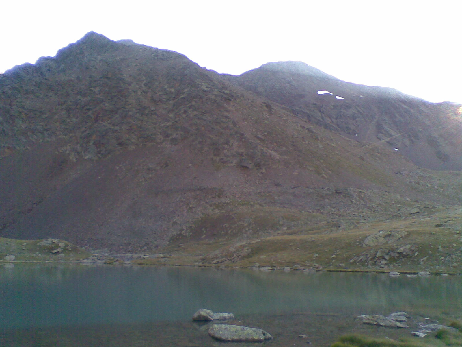 Cima Sternai vista dai laghetti